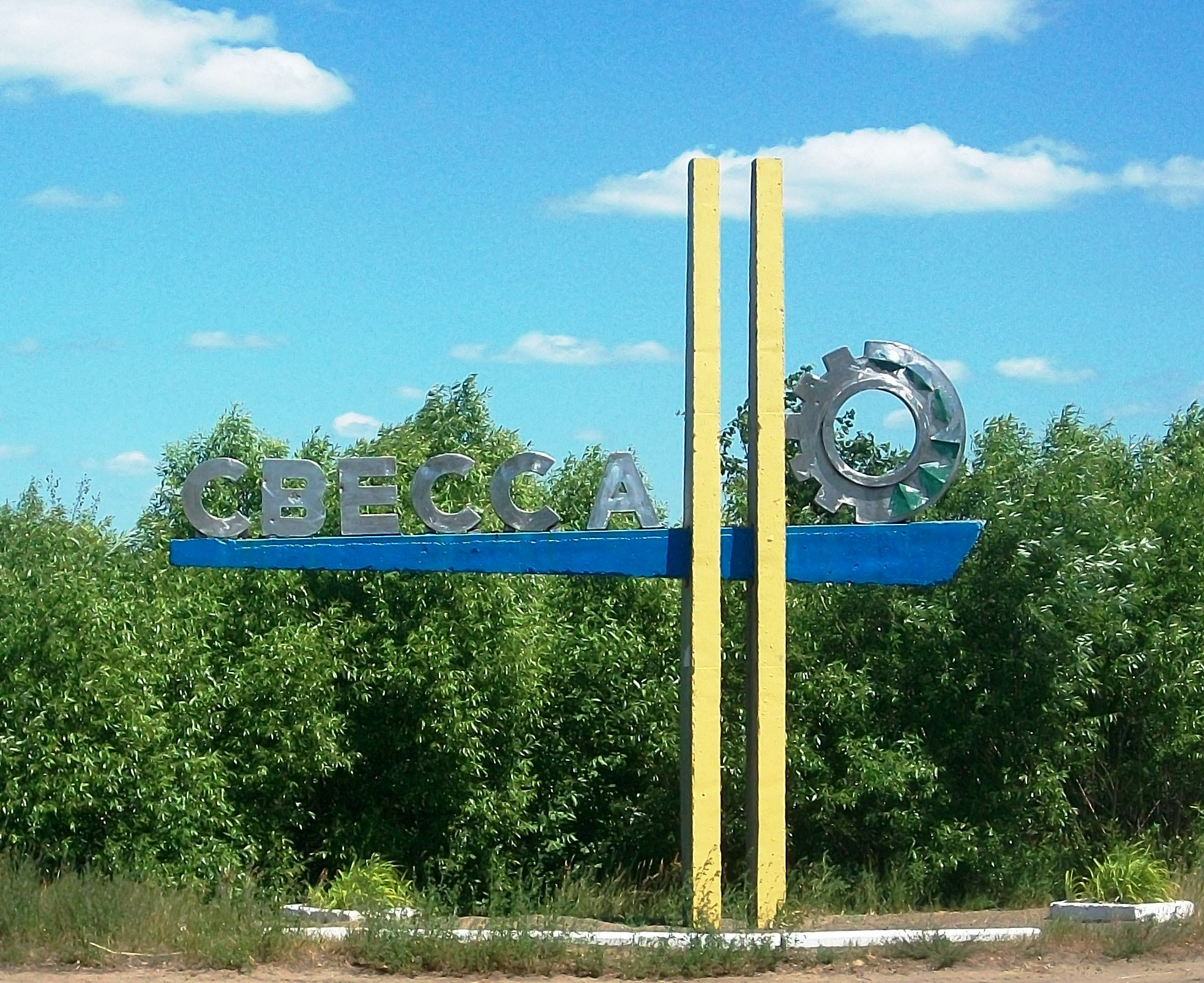 Свеса